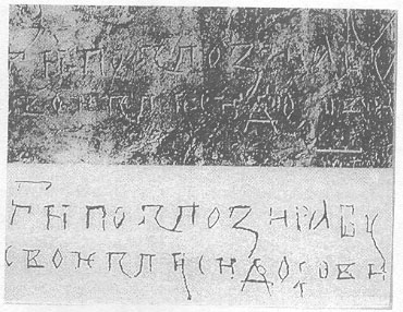 Графіто "Сидора" кінця ХІІІ - ХІV ст.